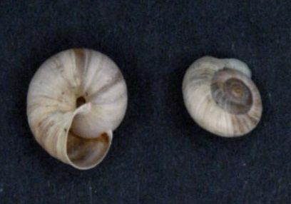 Pyrenaearia carascalensisPyrenaearia carascalensis (Michaud, 1831)